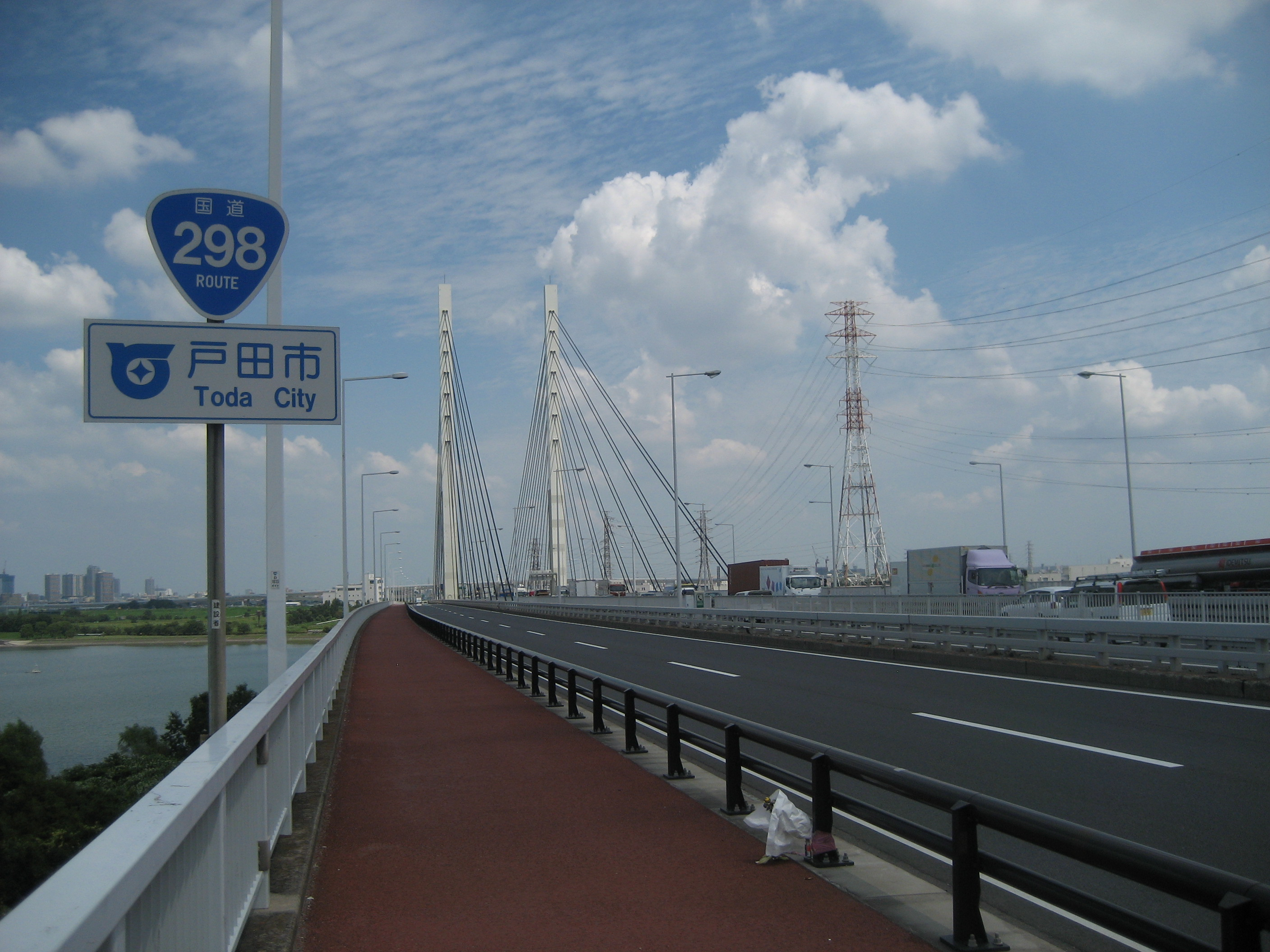 国道298号線埼玉県戸田市幸魂大橋付近